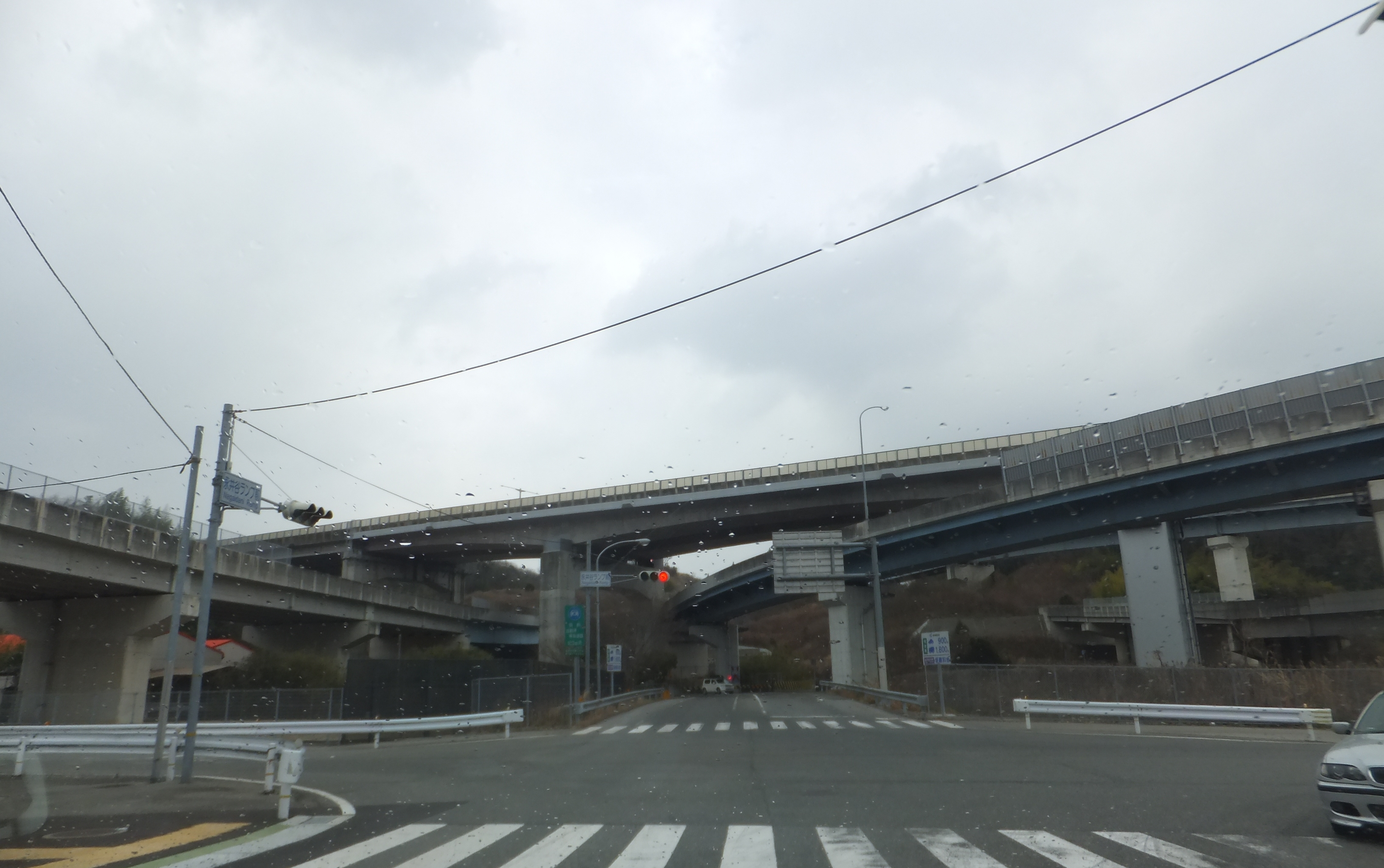 永井谷ジャンクション